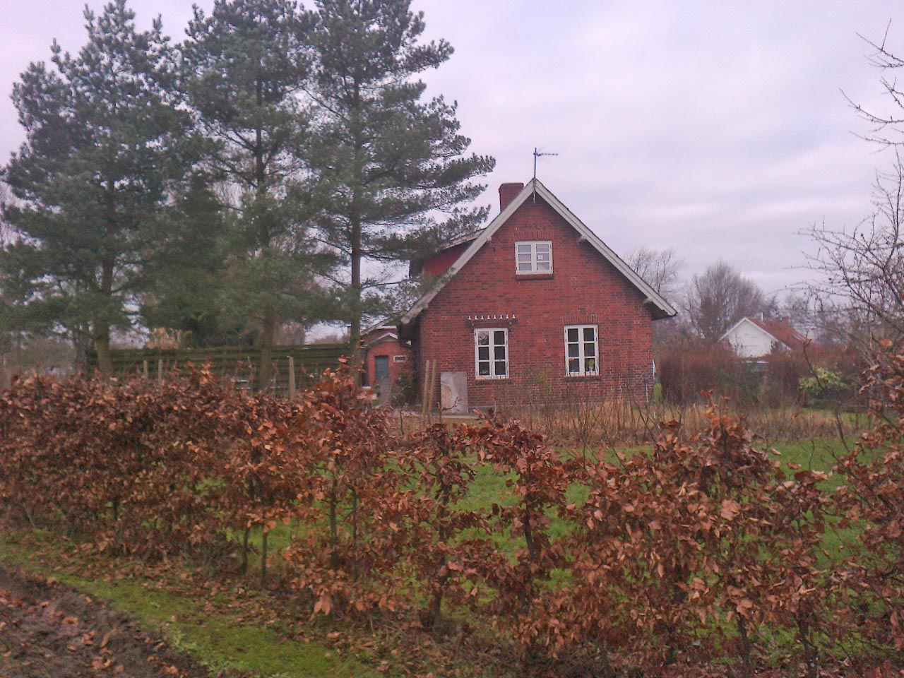 Neder Randlev Station